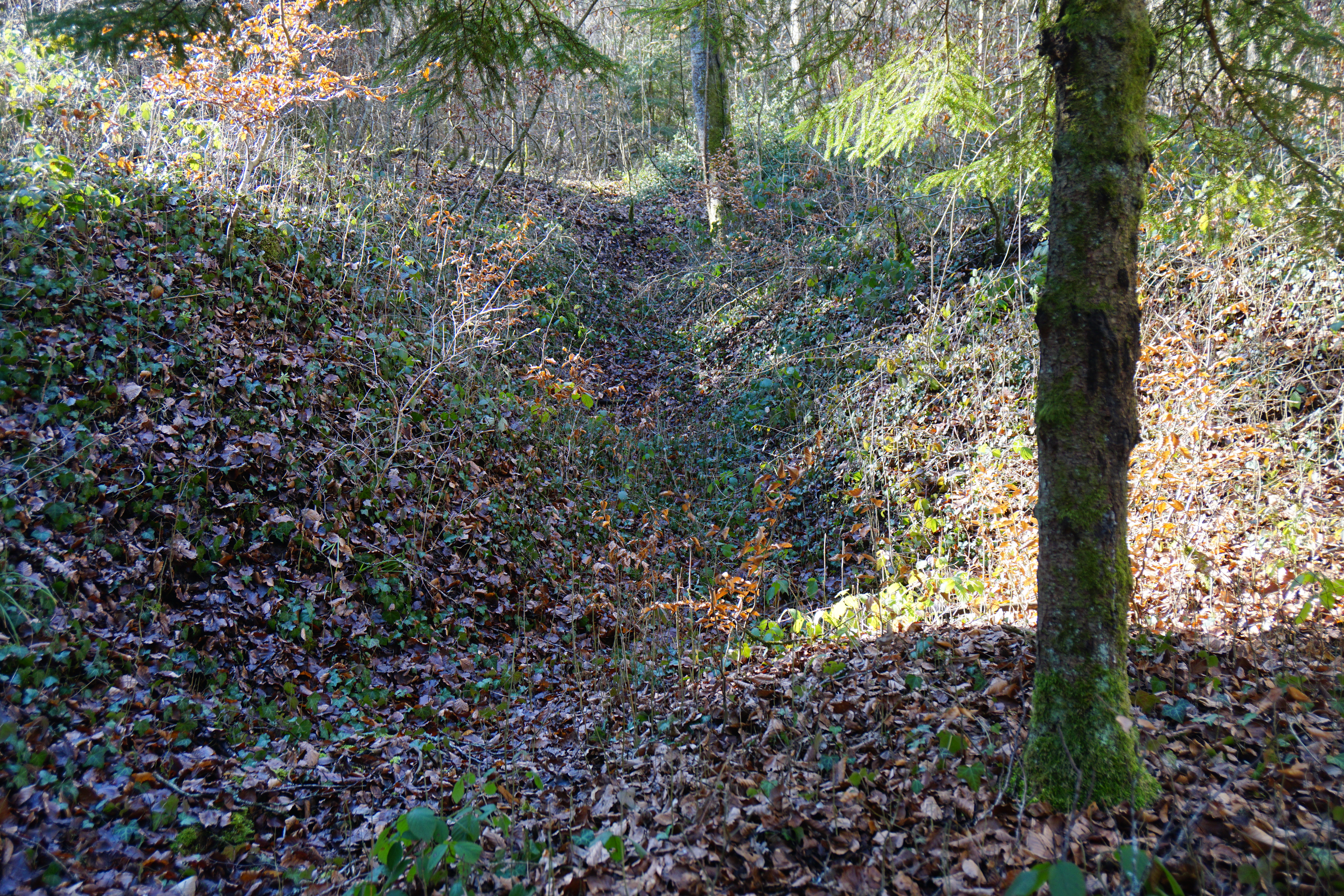 L'entrée bouchée de la galerie Marie (Concession de Suriauville).